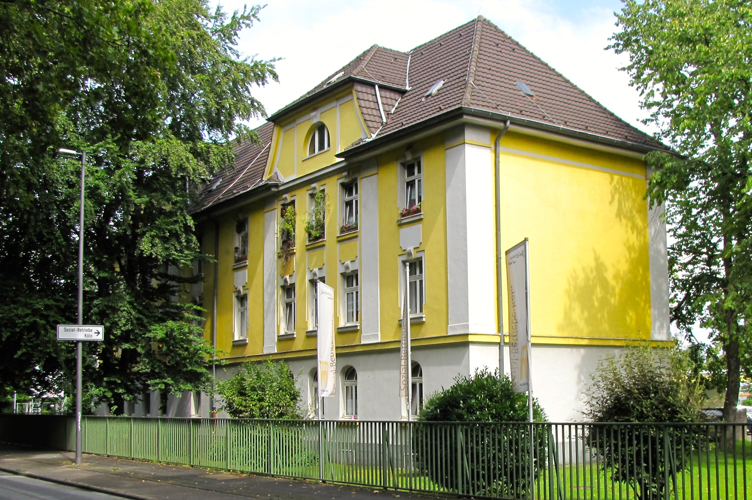 Köln-Riehl: Die Riehler Heimstätten wurden 1927 auf dem Gelände der ehemaligen Kasernen an der Boltensternstraße gegründet. Heute Sozialbetriebe Köln gGmbH, Riehl